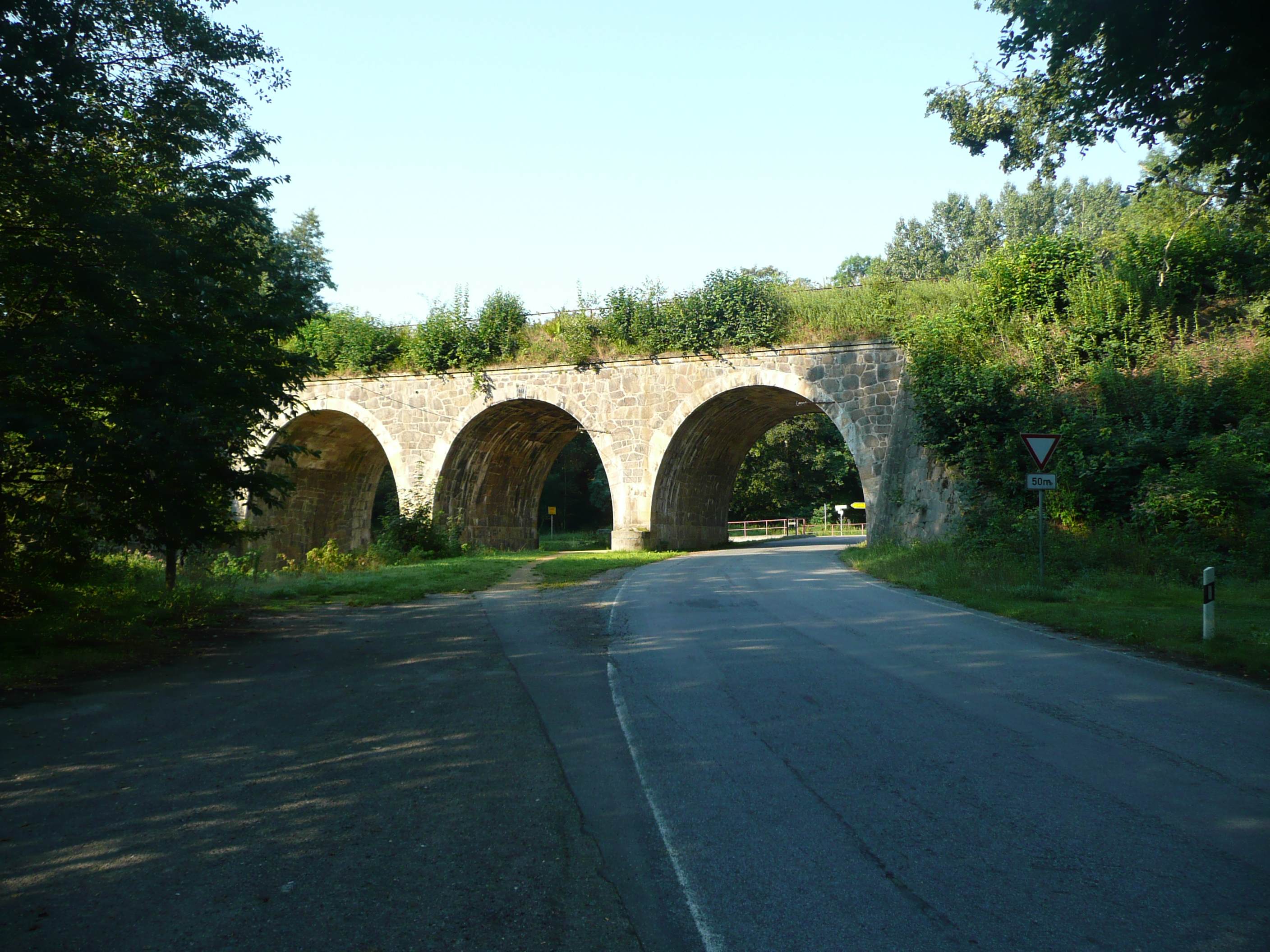 Unterquerung der Schmalspurbahn unter der Bahnstrecke Riesa-Nossen, Blickrichtung Döbeln